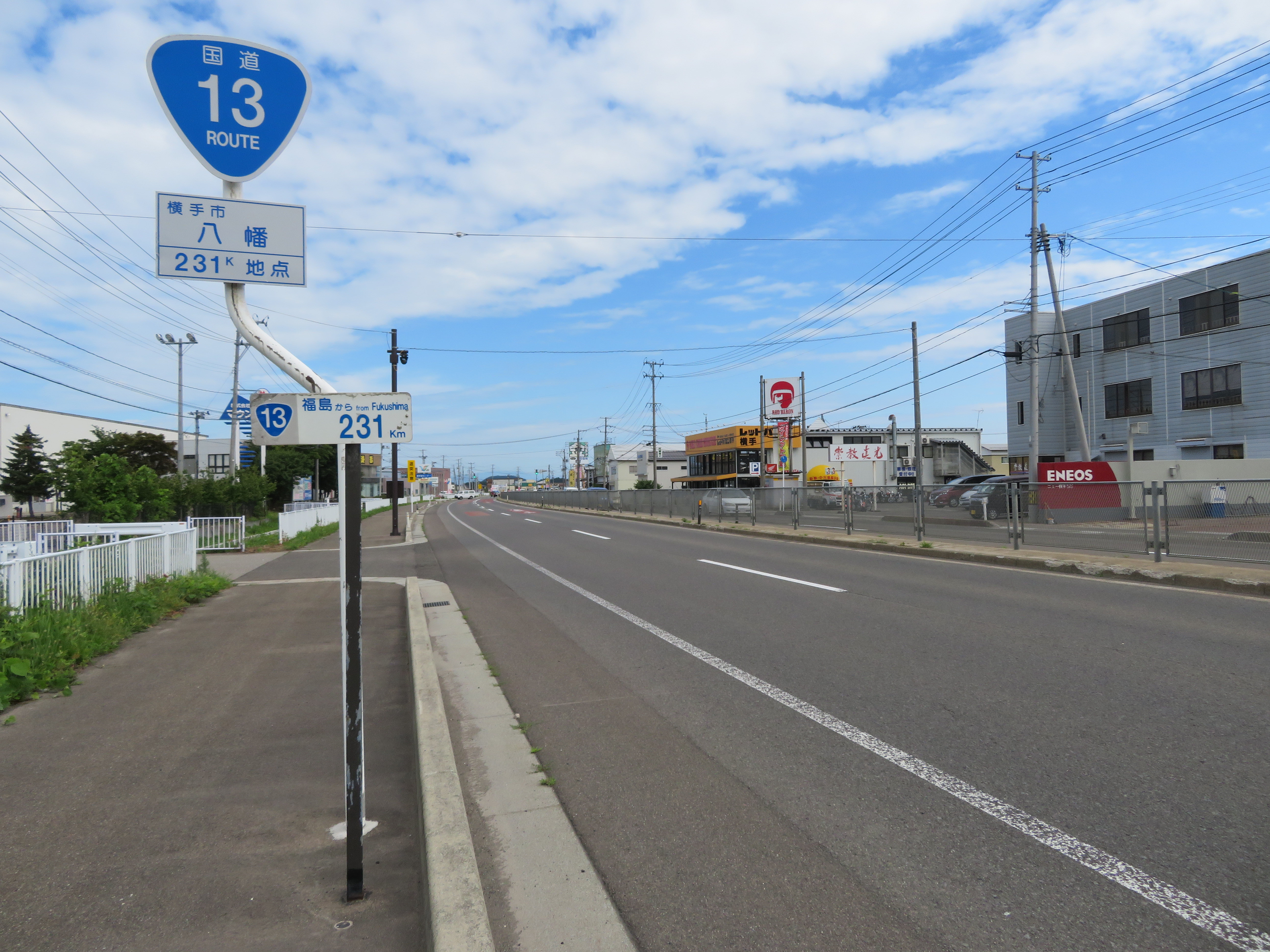 国道13号線横手バイパス秋田県横手市八幡付近（大仙市方面を撮影）